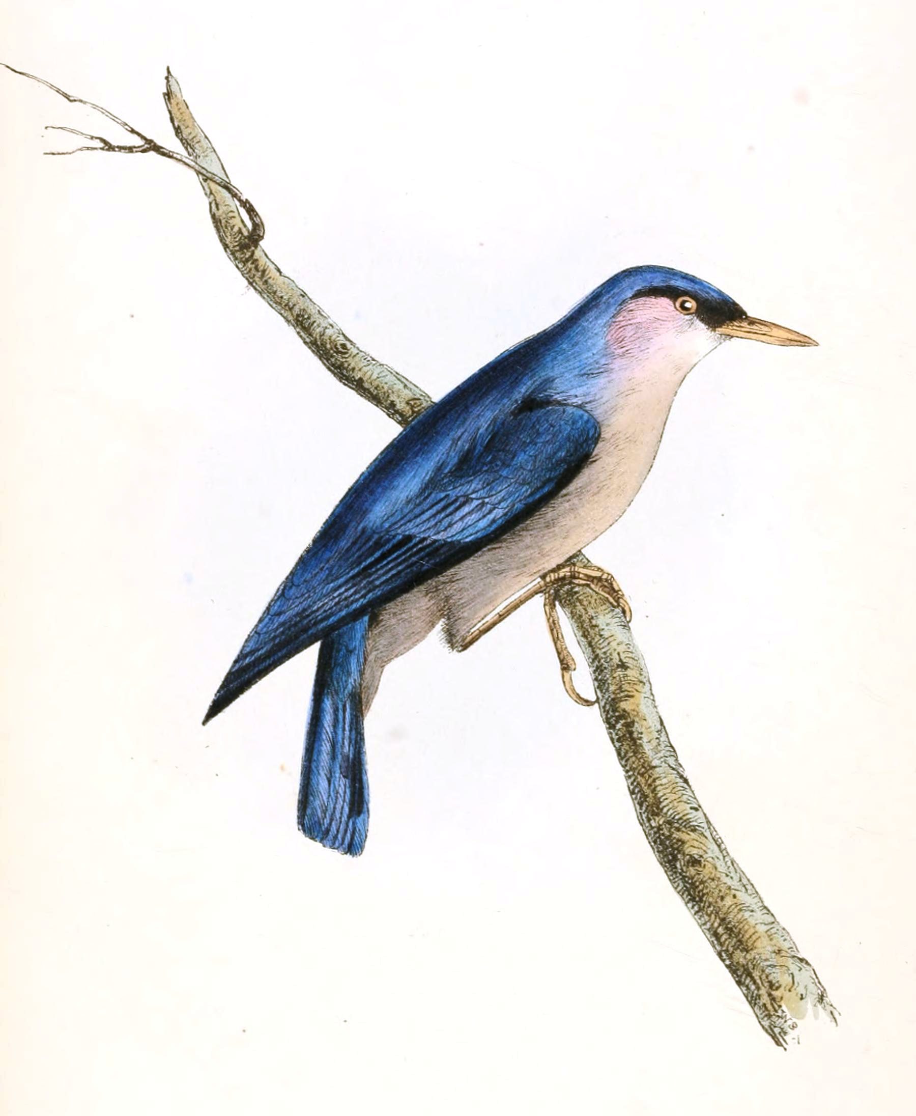 Sitta frontalis